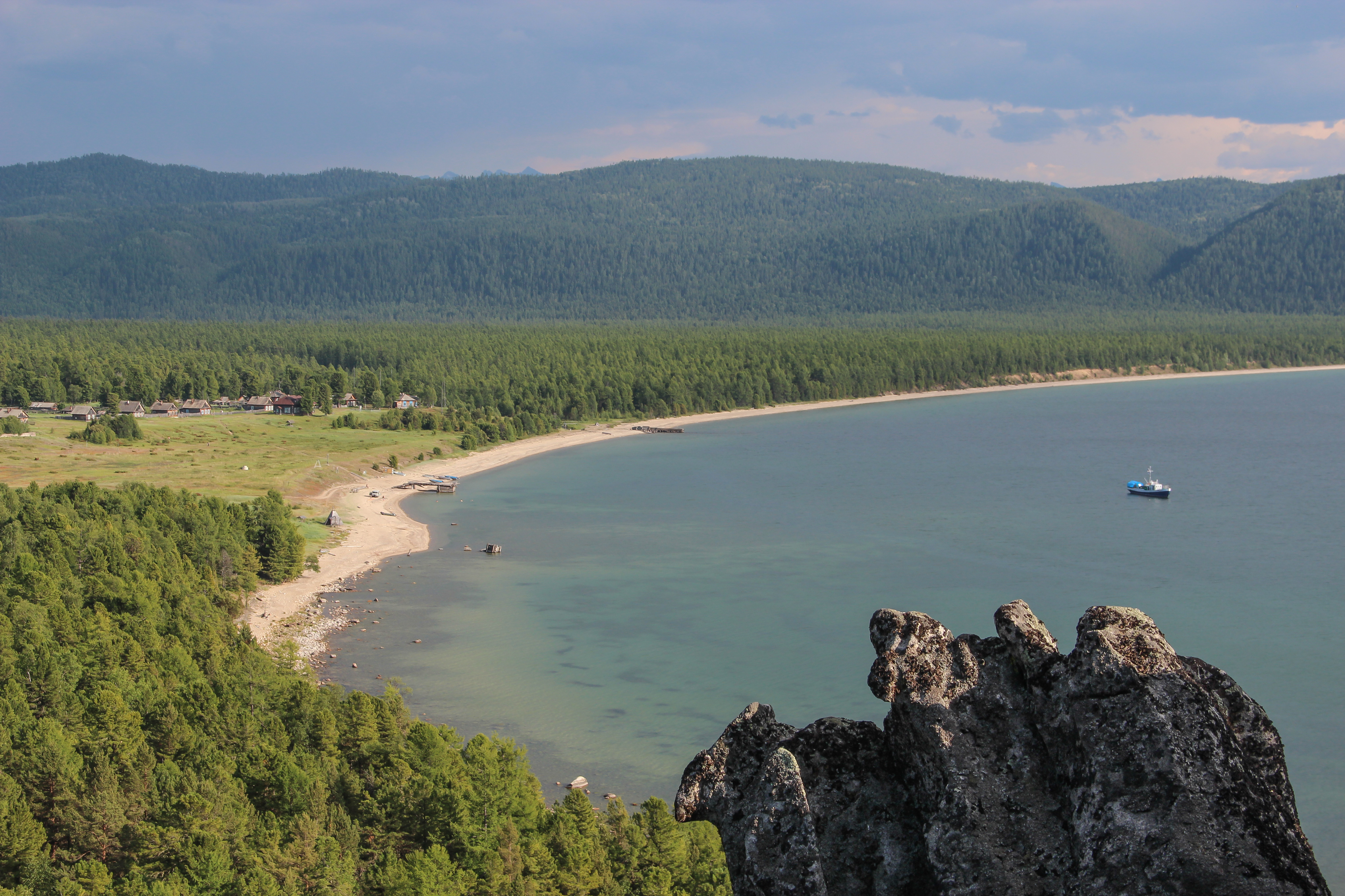 Баргузинское побережье Байкала, Баргузинский район This image is related to the protected area of Russia number 0300097